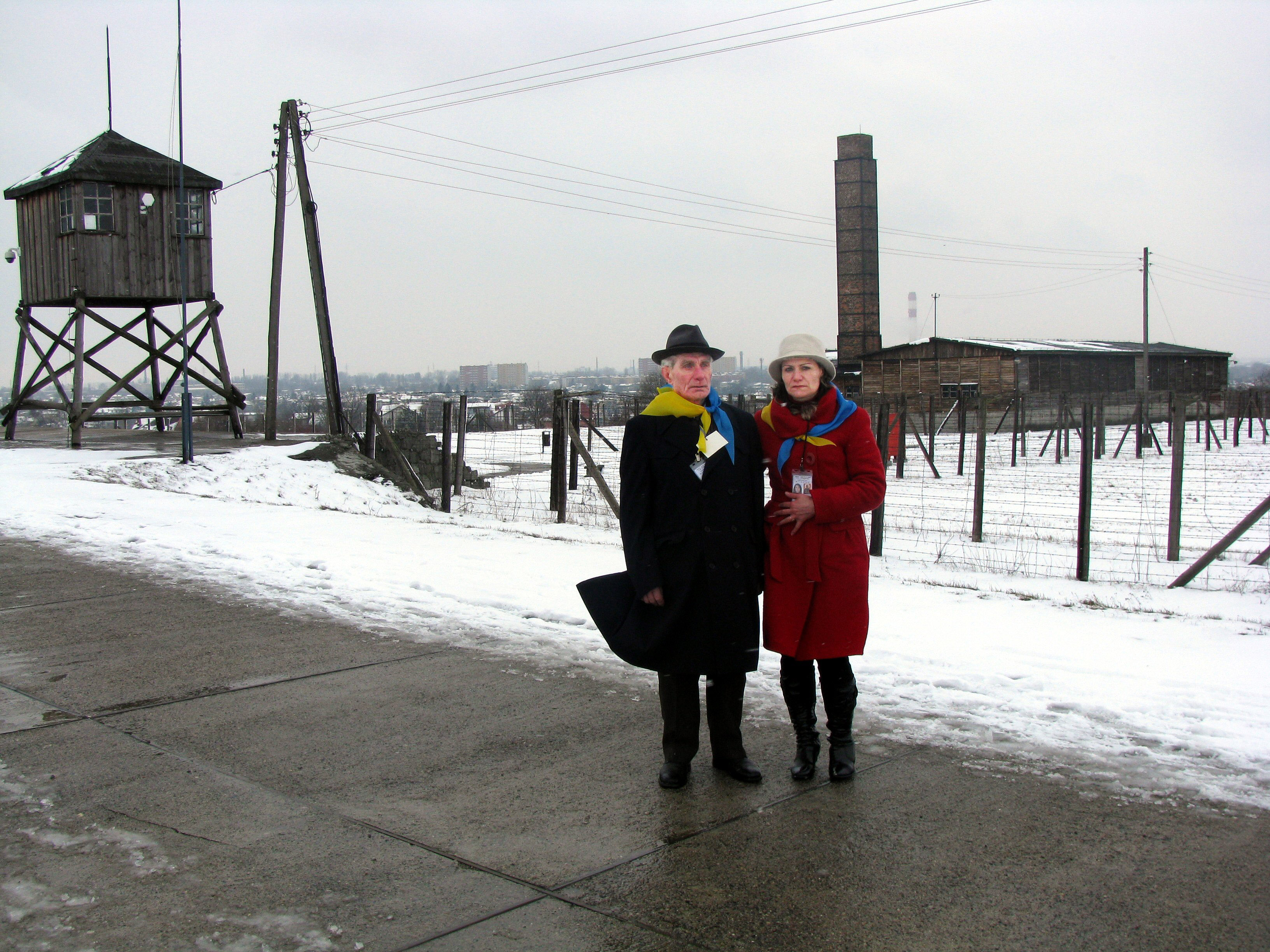 Проща на "Майданек", Разом з дочкою Зоряною